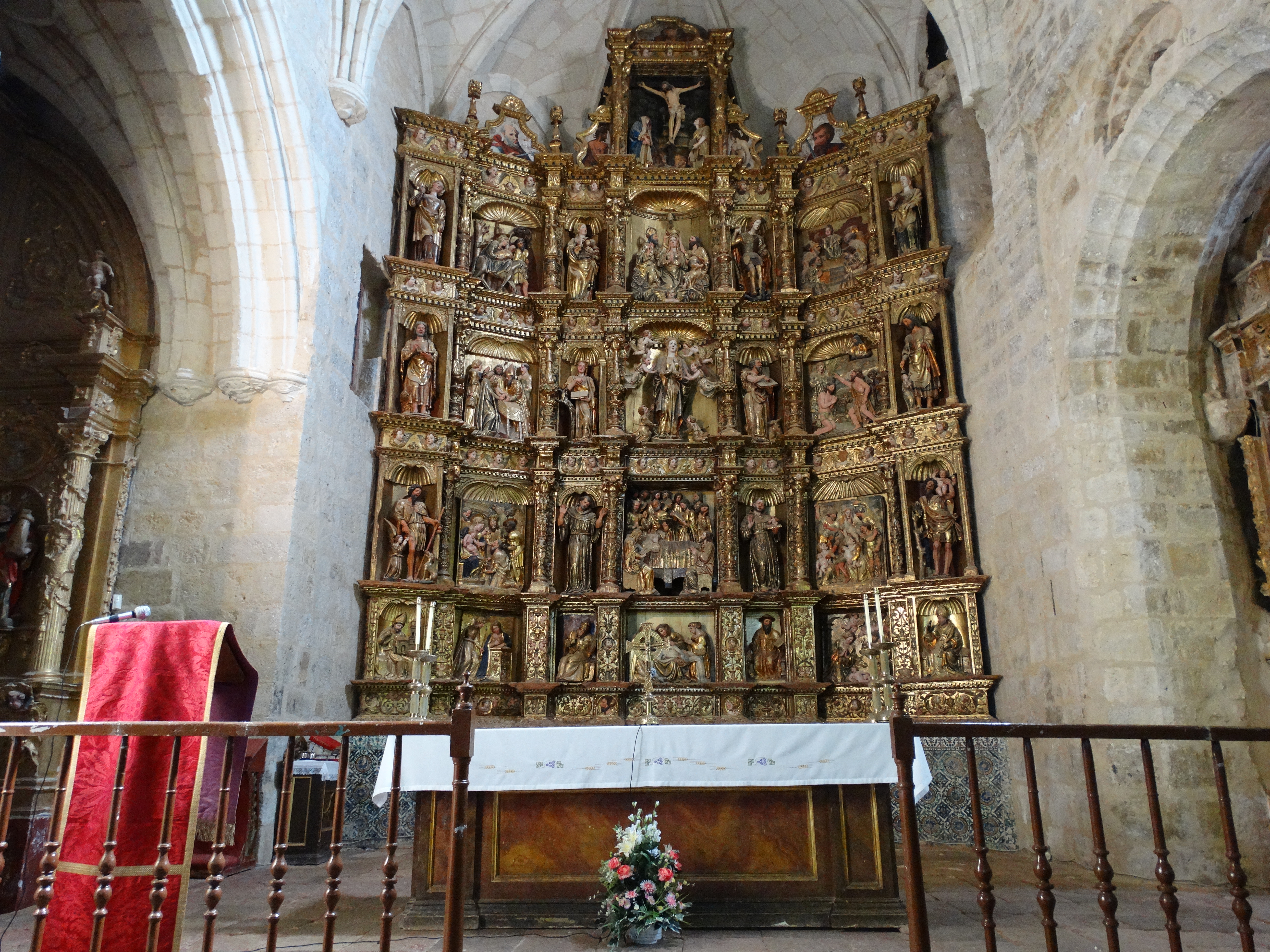 Torremormojón, provincia de Palencia, España. Iglesia de Santa María del Castillo. Retablo mayor. Abajo en el banco puede verse entre las esculturas de Agustín, Gregorio, Jerónimo y Ambrosio, influencia de Valmaseda; los relieves: Anunciación de Juan de Valmaseda), Piedad y Natividad, atribuido a Francisco Giralte. En el primer cuerpo las esculturas de San Roque (Valmaseda), San Francisco, San Antonio y San Cristóbal. En las calles, tres relieves: Epifanía bajo venera (Valmaseda); Tránsito de la Virgen (atribuido a Juan de Ortiz el Viejo); Matanza de los Inocentes bajo venera. Segundo cuerpo: en las entrecalles las esculturas de los 4 evangelistas, Marcos, Juan, Lucas y Mateo (atribuidos a Valmaseda). En los relieves de las calles: Circuncisión, Asunción (calle principal), Bautismo de Cristo (atribuidos a Valmaseda). Tercer cuerpo:4 esculturas en las entrecalles, Catalina, Magdalena, Miguel y Martín. Relieves de las calles: Huida a Egipto; Coronación de la Viergen en calle central (atribuido por Portela a Juan de Camb ray y por Parrado a Juan Ortiz el Viejo); Cristo entre los doctores. Ático: Calvario en la calle central. Crucifijo de modelos de Valmaseda enmarcado por columnas abalaustradas. A ambos lados tablas de perfil quebrado con Adán y Eva. A su lado otras dos tablas de perfil quebrado con San Pedro y San Pablo. En vértice: tabla con el Padre Eterno.